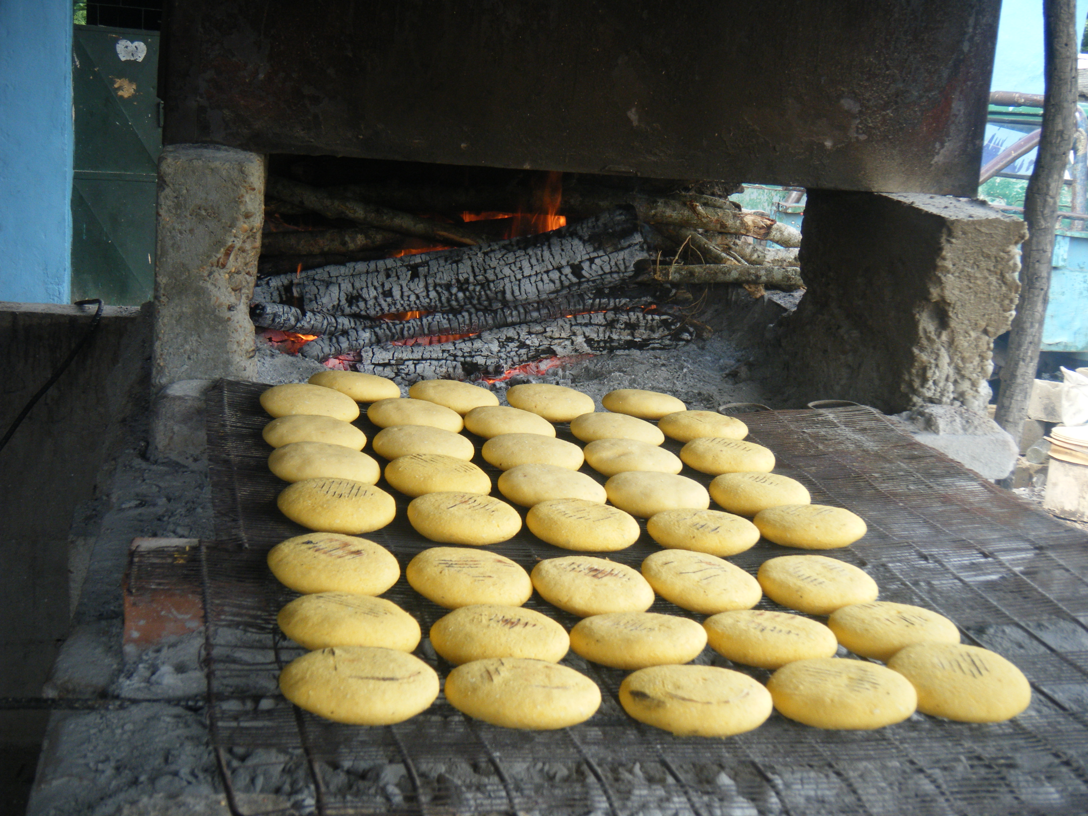 Arepas de maíz pilado y a leña en Aragua de Maturin. Monagas. Venezuela